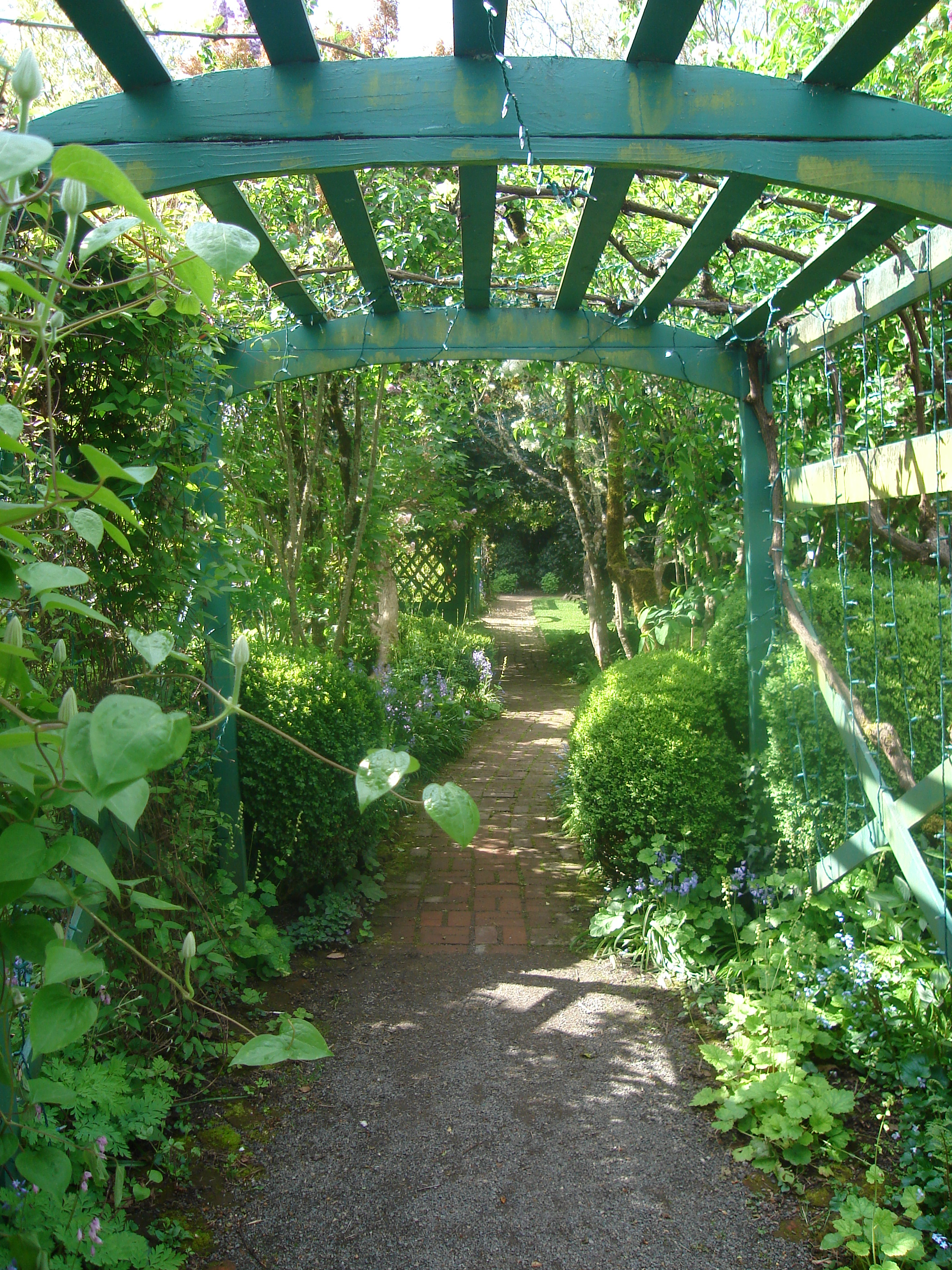 A pergola in a garden in Oregon, USA.